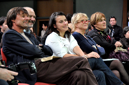 Eva Joly